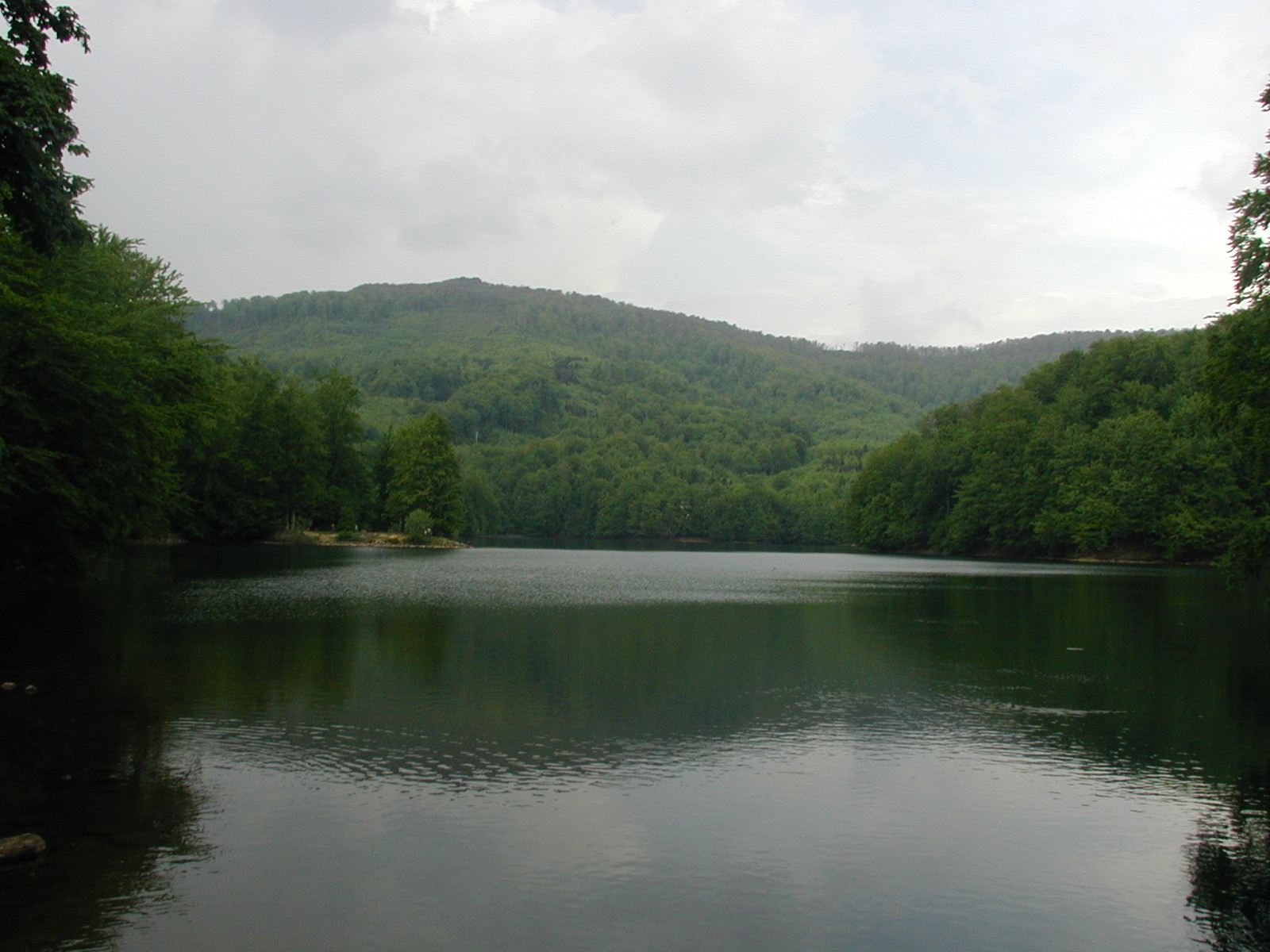 Morské Oko (Veľké Vihorlatské jazero)